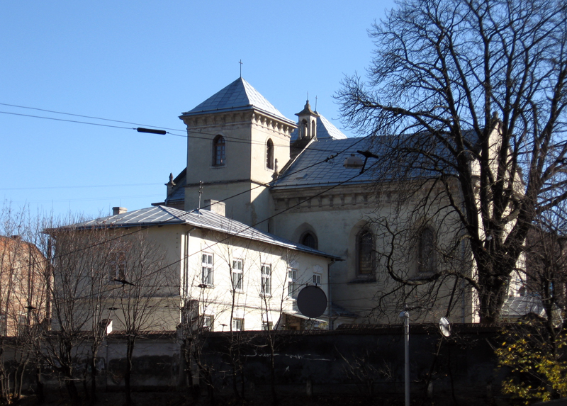 Монастырь и Костел Святого Лазаря во Львове